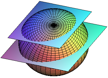 Figura realizada por M.Romero Schmidkte ✉ con el programa Mapple, especialmente para la Enciclopedia Libre y la Wikipedia.